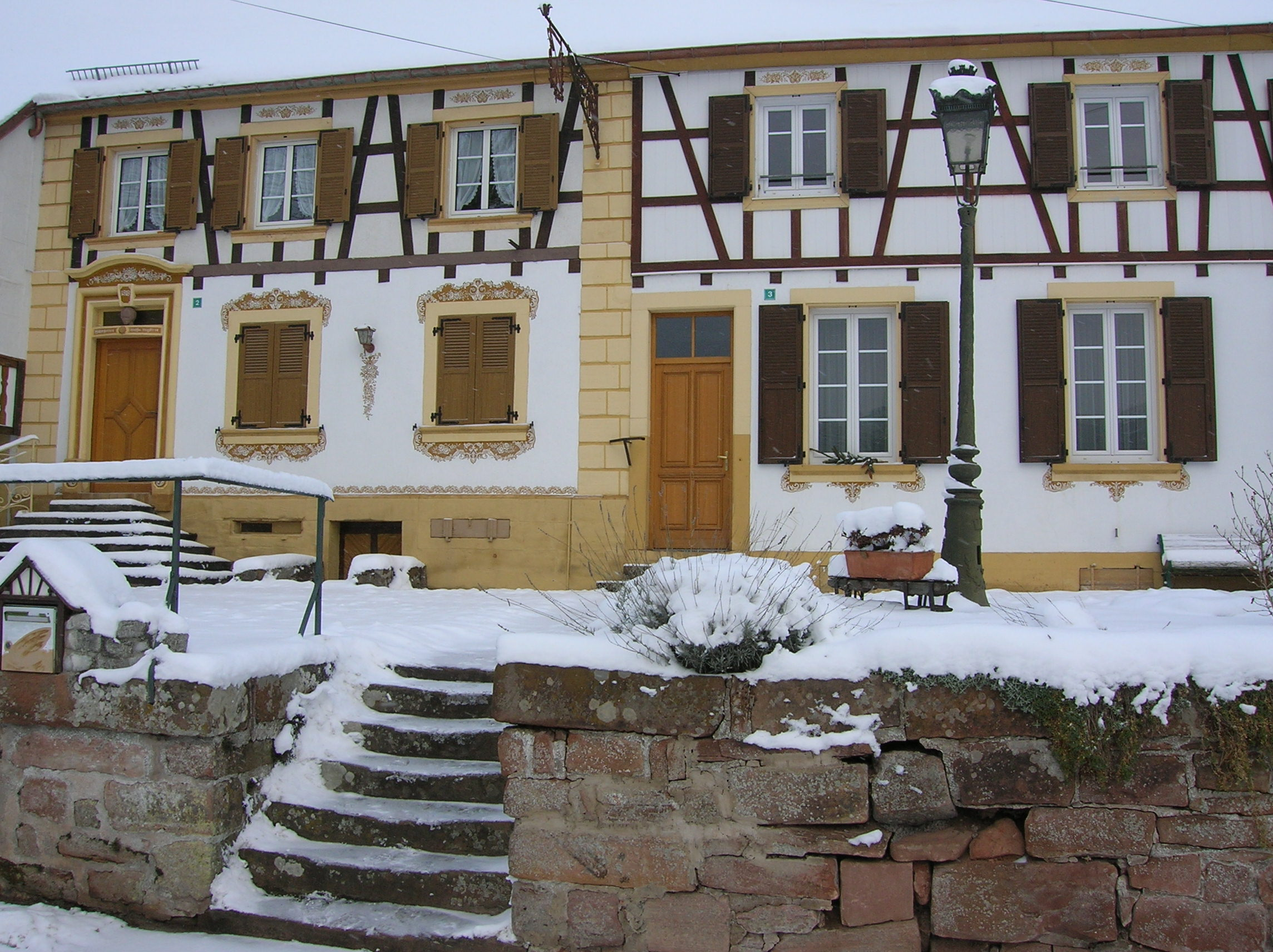 Hüs z Erketswiller, Unterelsàss